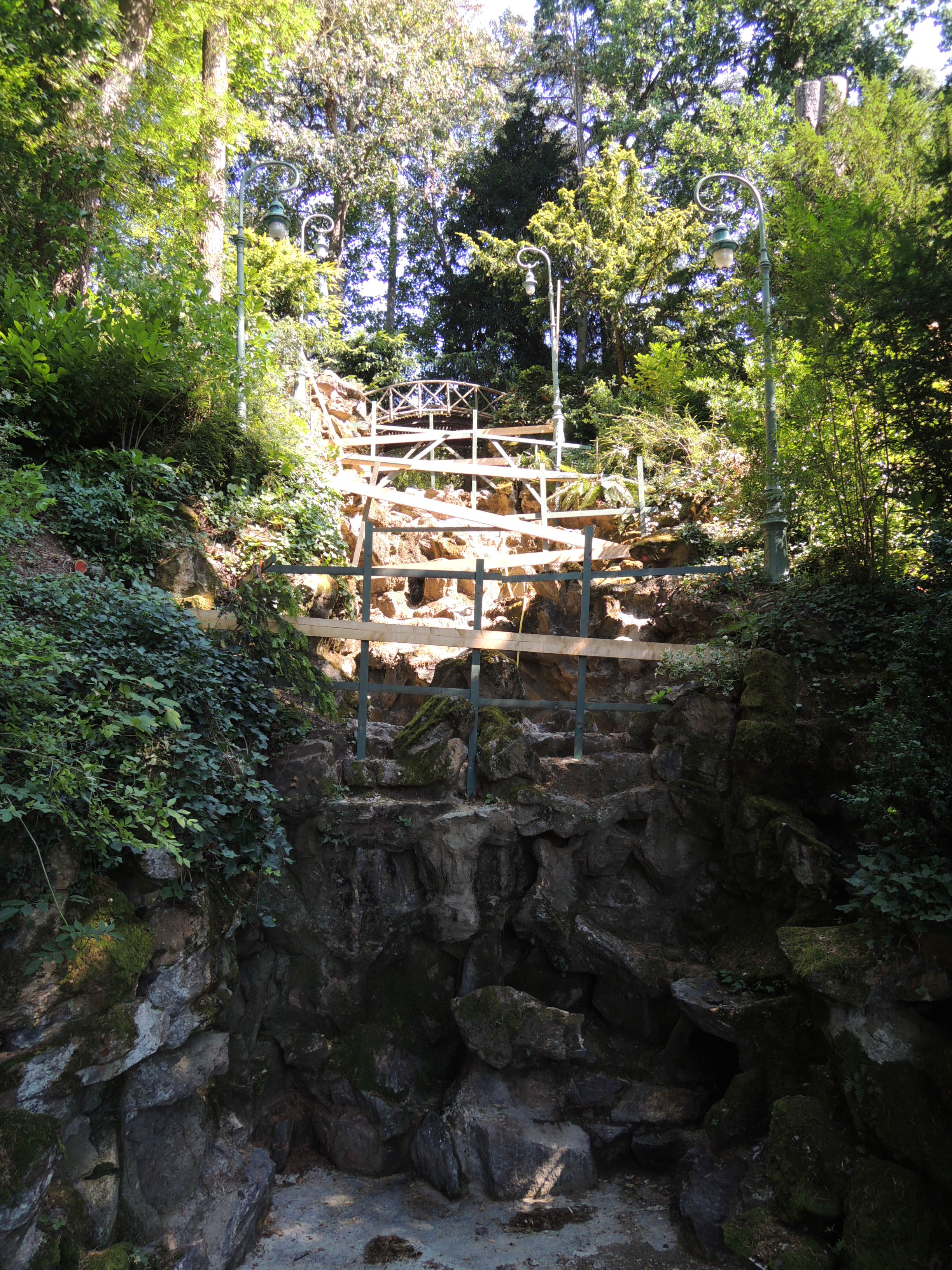 Vue de la cascade des Catherinettes asséchée et mise en sécurité pour des travaux de rénovation (août 2013).